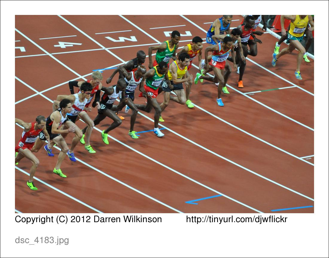 10k start